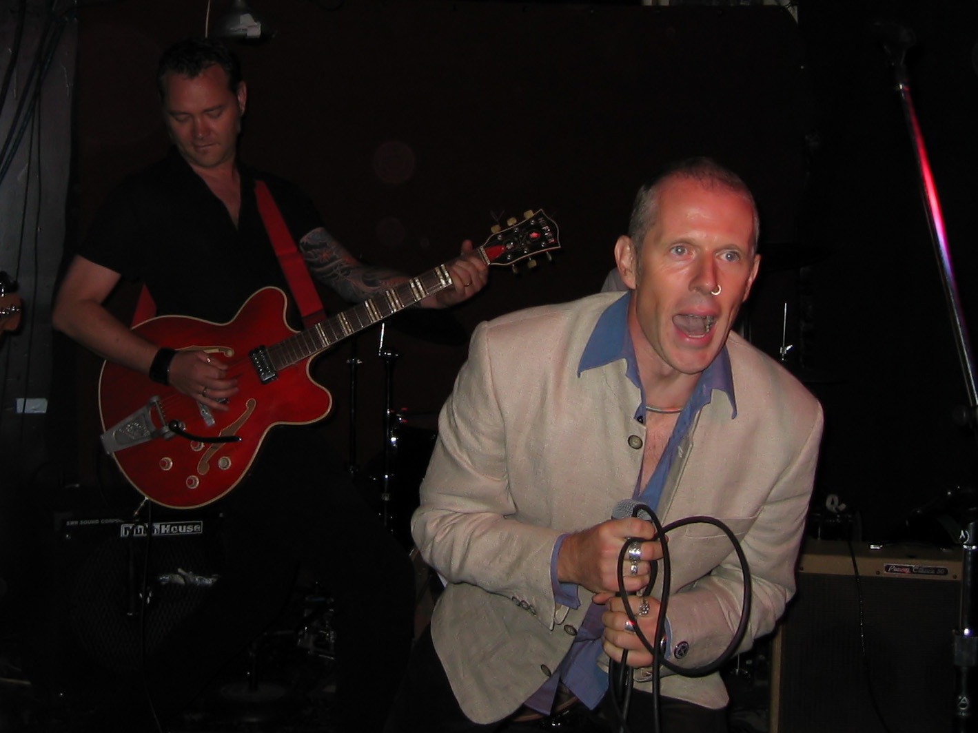 2037 Ausgang